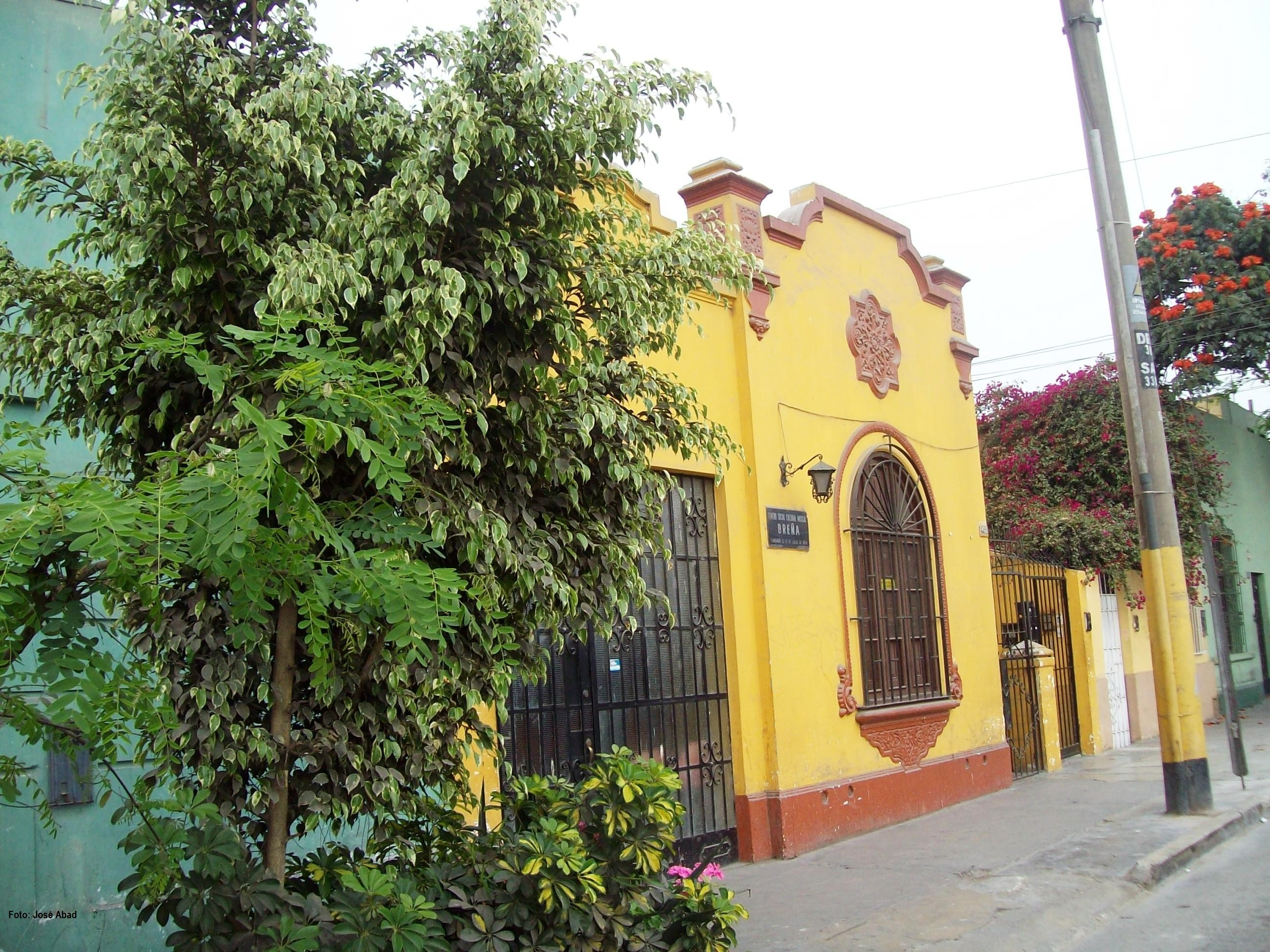 Centro musical en la cuarta cuadra del Jr. Joaquín Olmedo, en Breña.